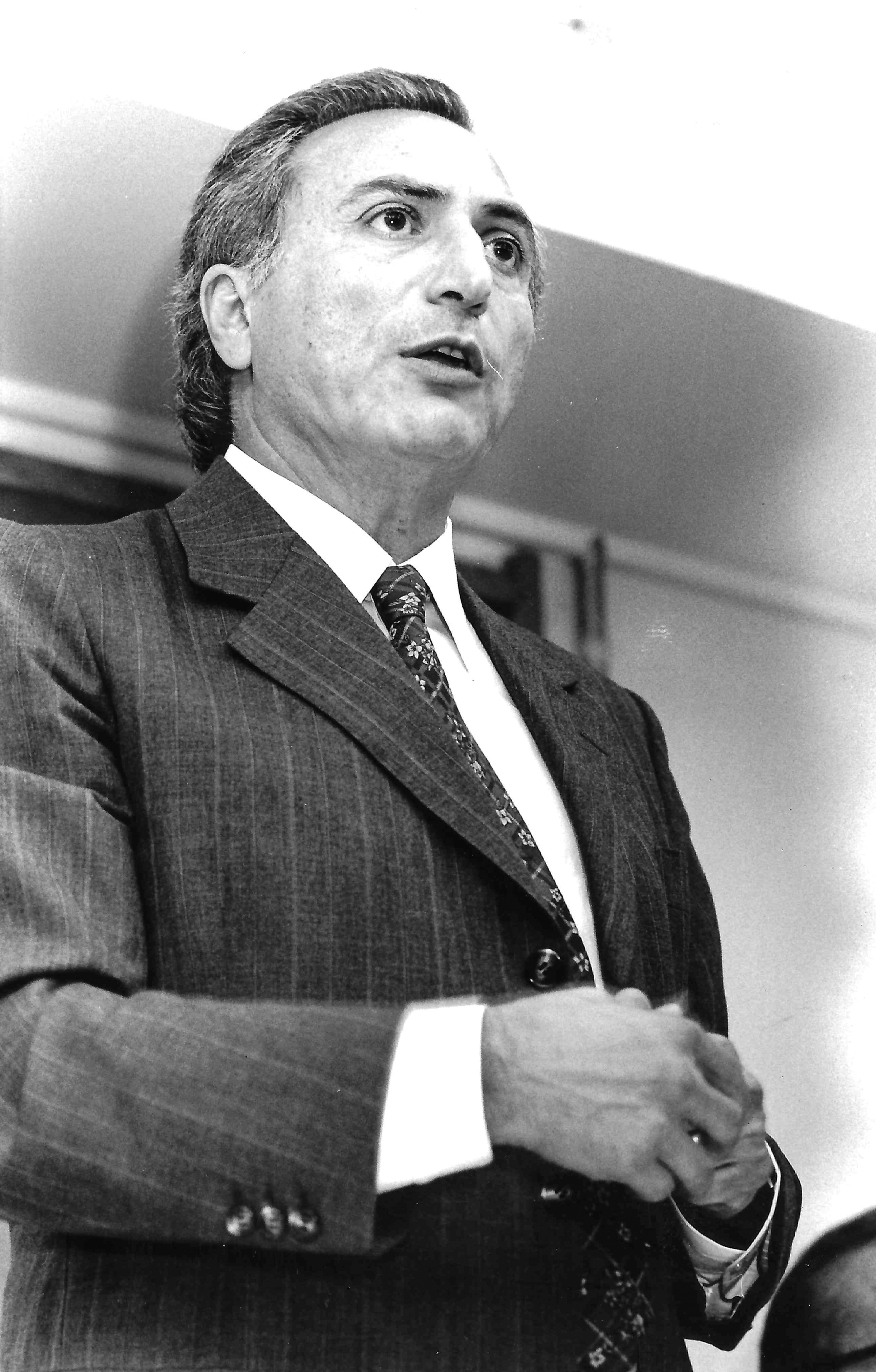 Foto de época de Michel Temer disponibilizado por sua assessoria. Data precisa não informada.